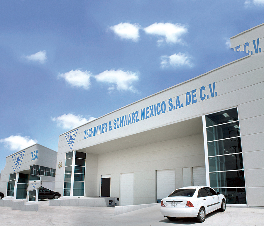 Standort Mexiko